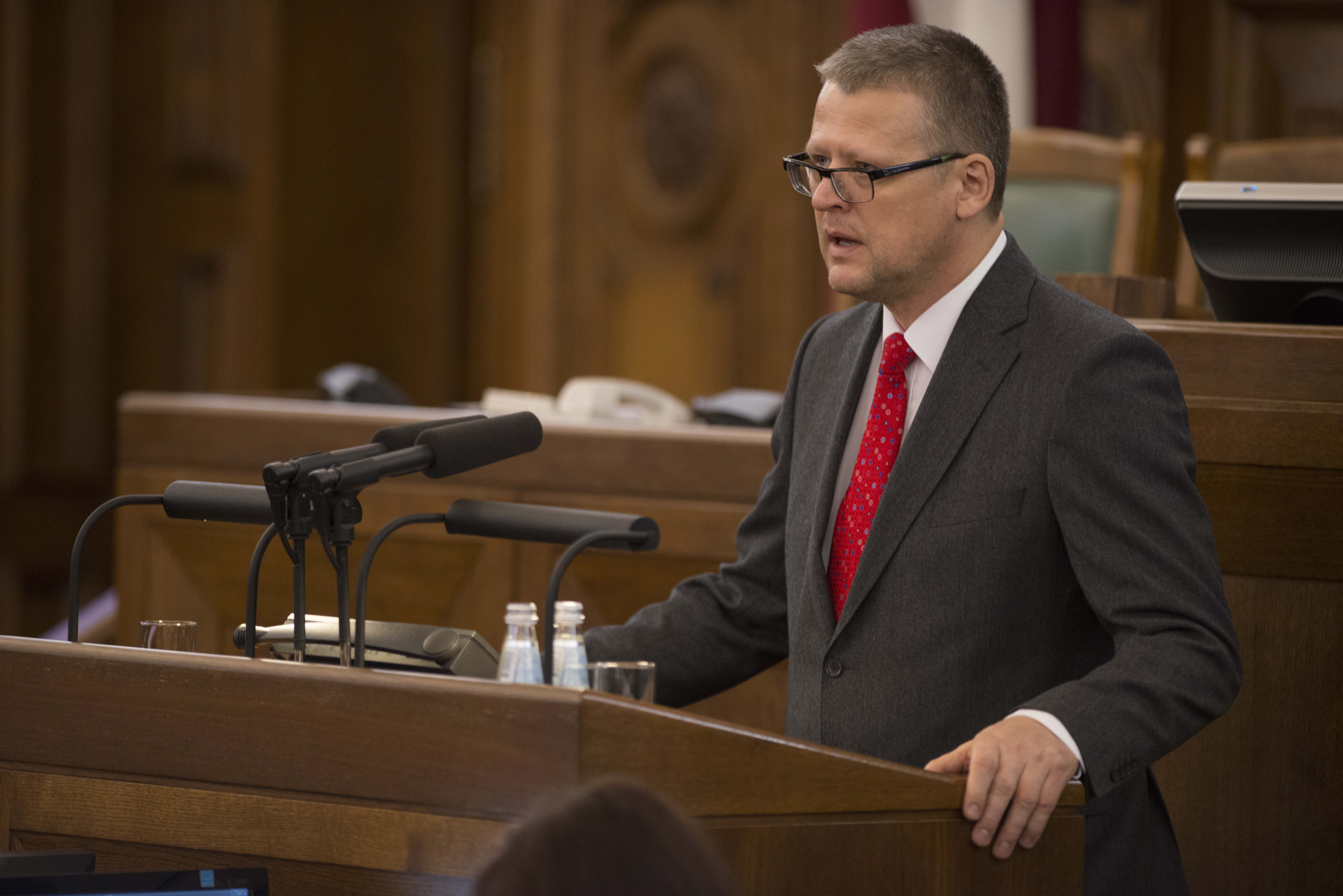 2014.gada 4.novembris. Deputāts Guntis Belēvičs dod svinīgo solījumu. Foto: Juris Vīgulis, Saeimas Kanceleja Izmantošanas noteikumi: saeima.lv/lv/autortiesibas